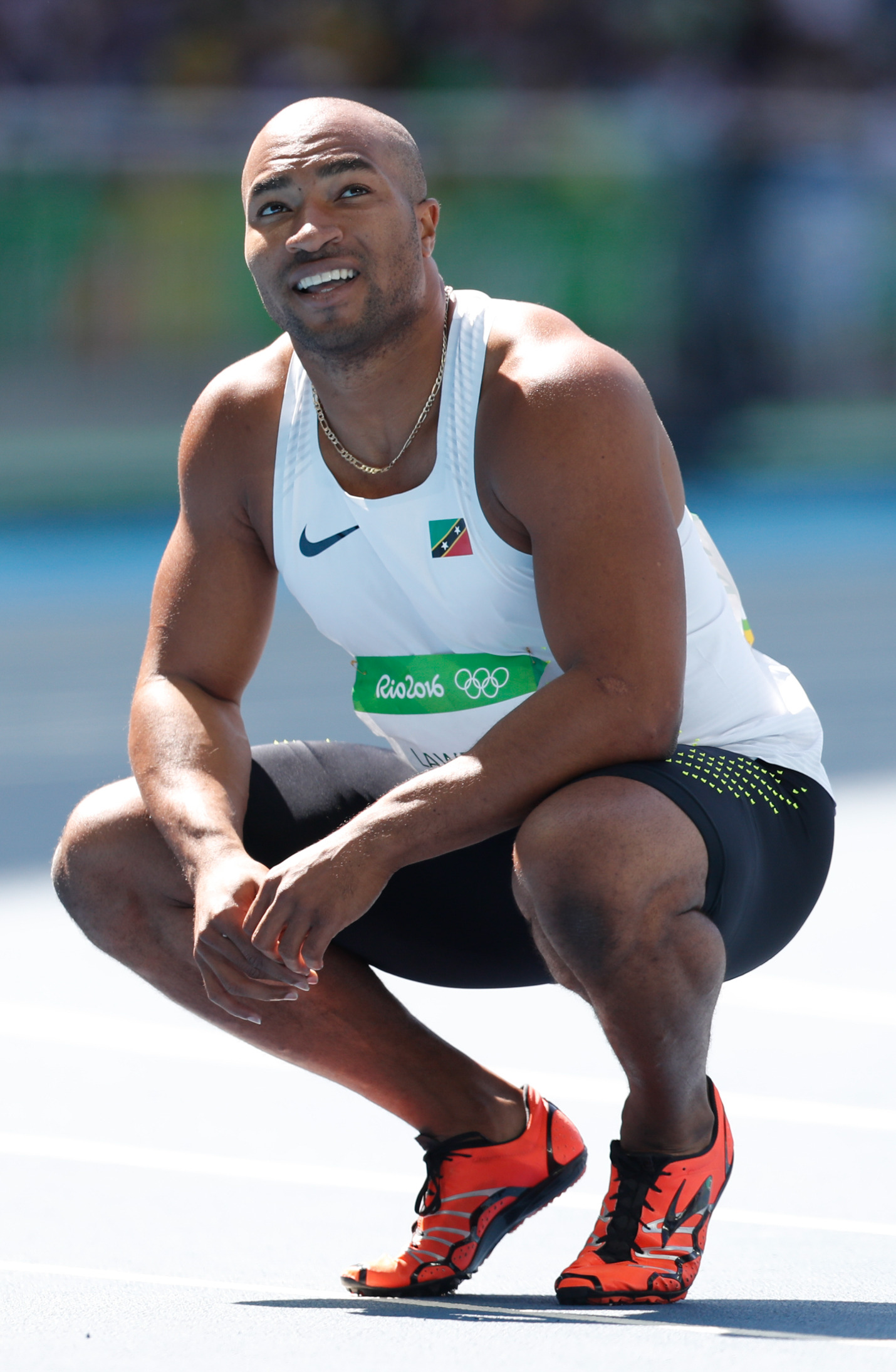 Men's 100 m sprint heats